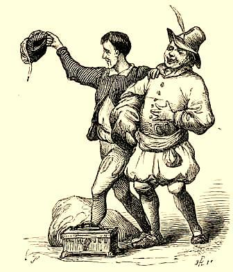 Chanfalla kaj Chirinos, la du trompoŝtelistoj ruzaj de Marionetejo de Fabeloj, de Miguel de Cervantes.